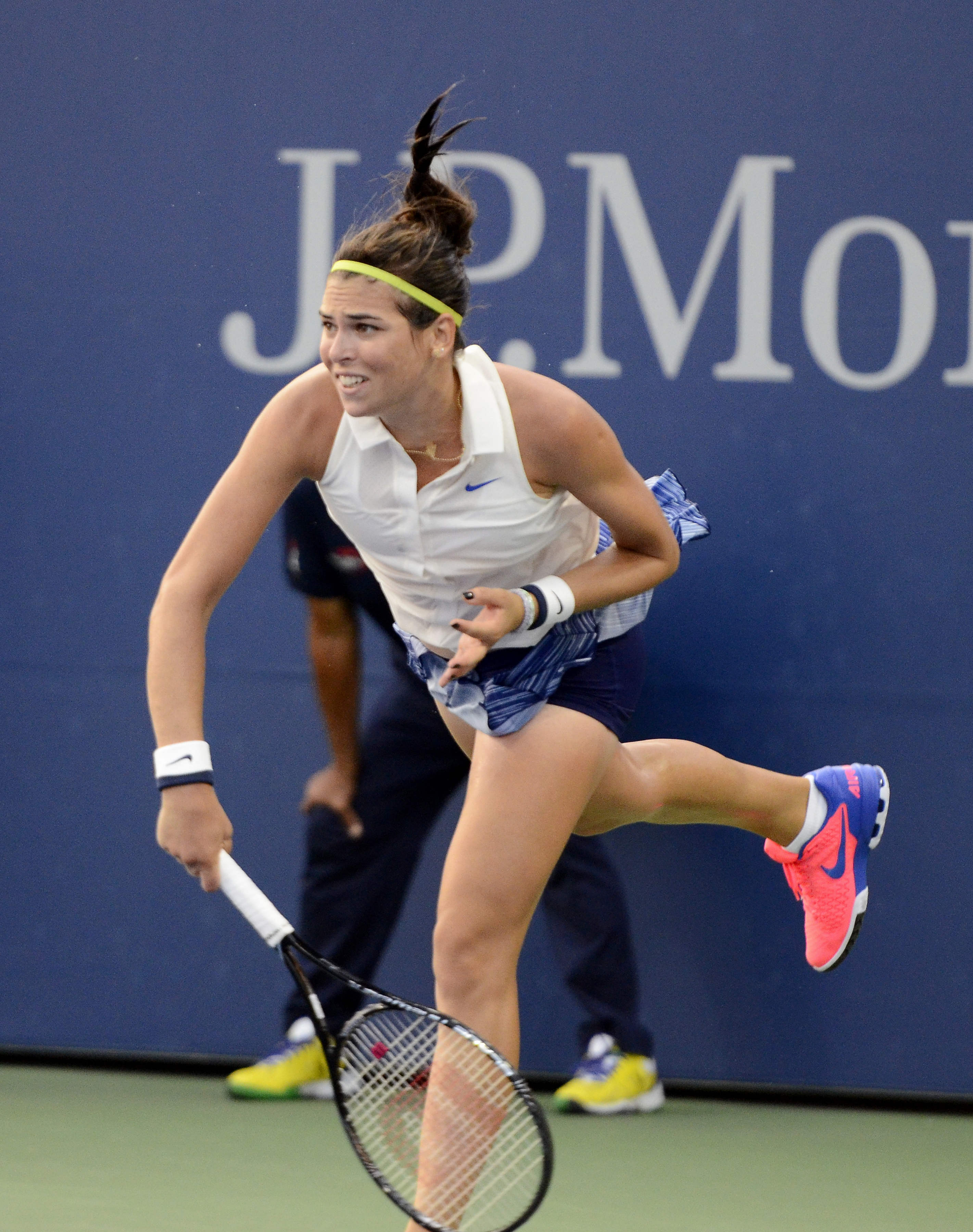 August 26, 2014 Queens, NY Carla Suarez Navarro (ESP) def. Ajla Tomljanovic (AUS)